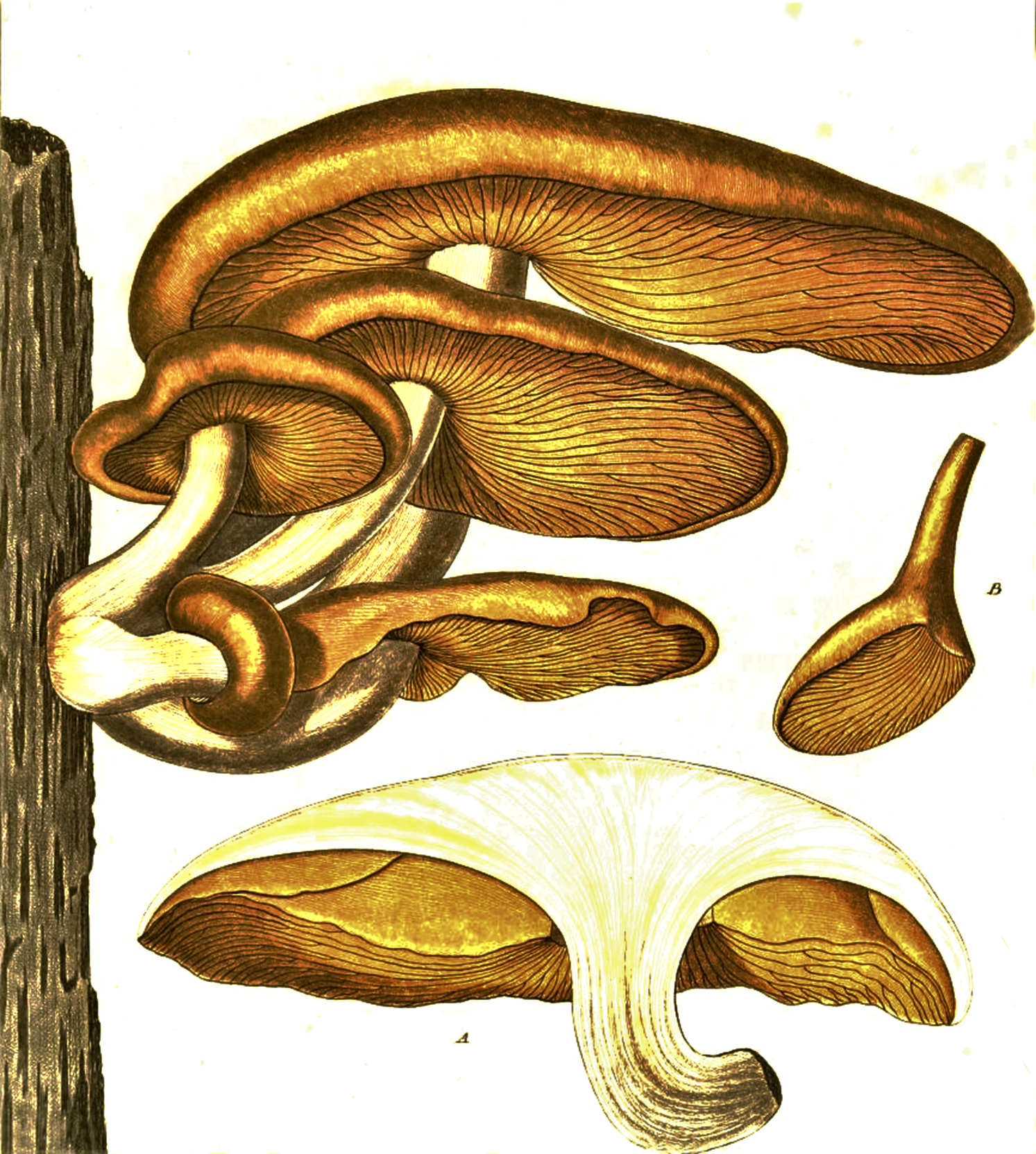 Agaricus palmatus Bull. (1785), heute Rhodotus palmatus (Bull.) Maire (1926)